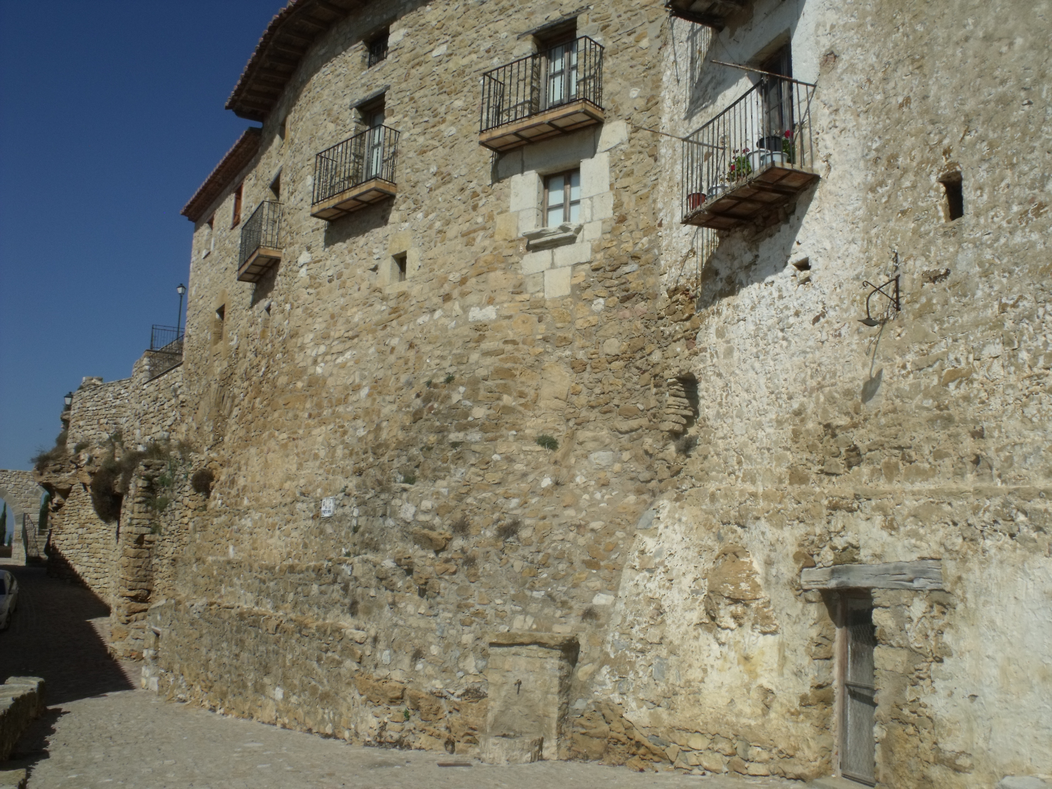 Murallas de Culla.